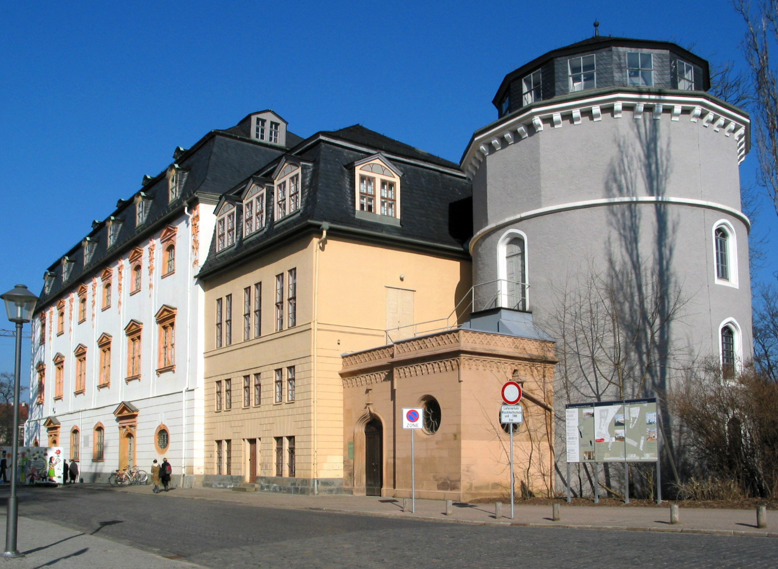 Das Grüne Schloss, das Herzog Anna Amalia 1761-66 als herzogliche Bibliothek im Spätbarock umbauen ließ. Hier die Südwestansicht im Jahre 2004 noch vor dem Brand.